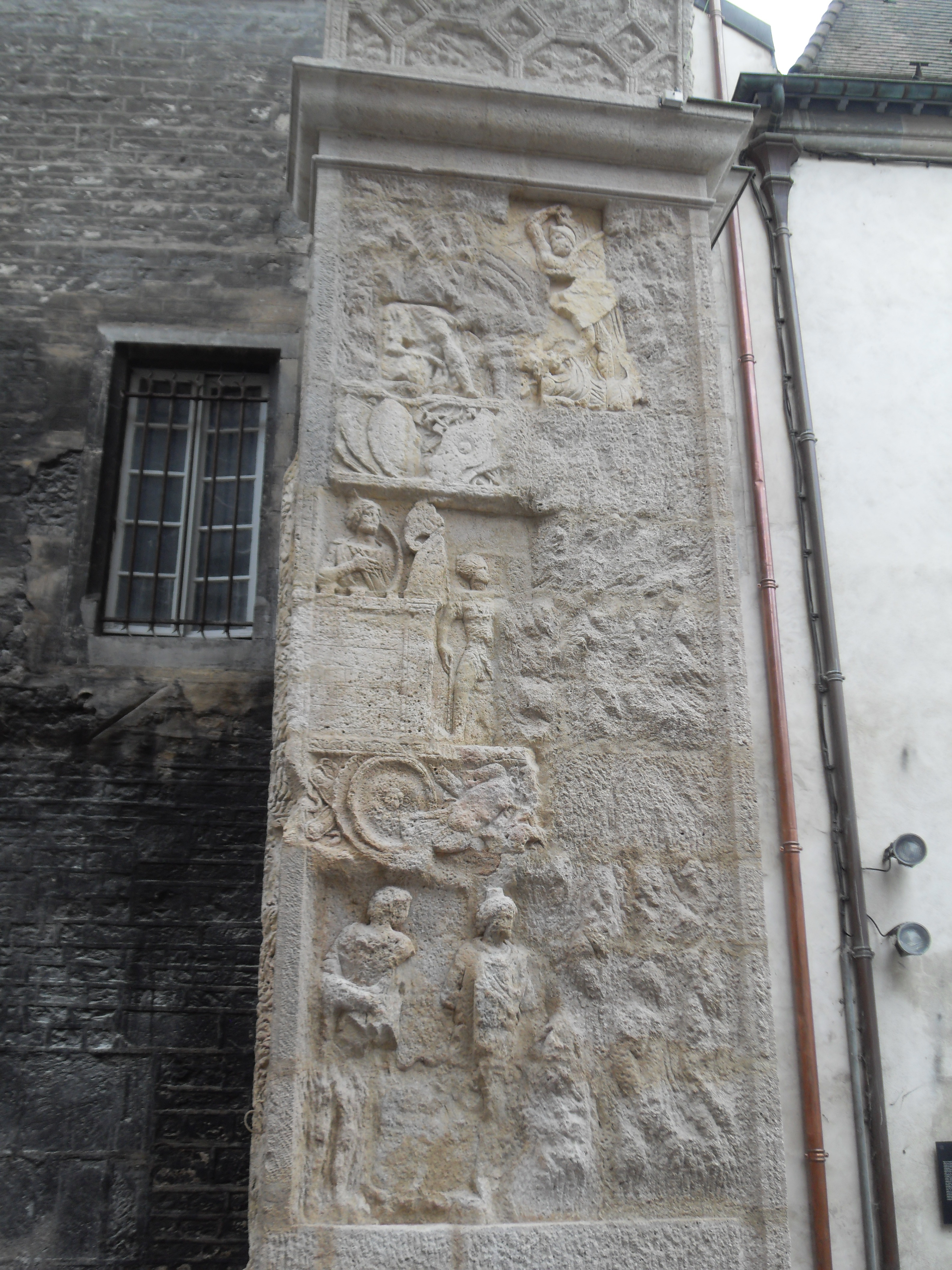 Vue détaillée de la porte Noire de Besançon: passage du piédroit ouest.